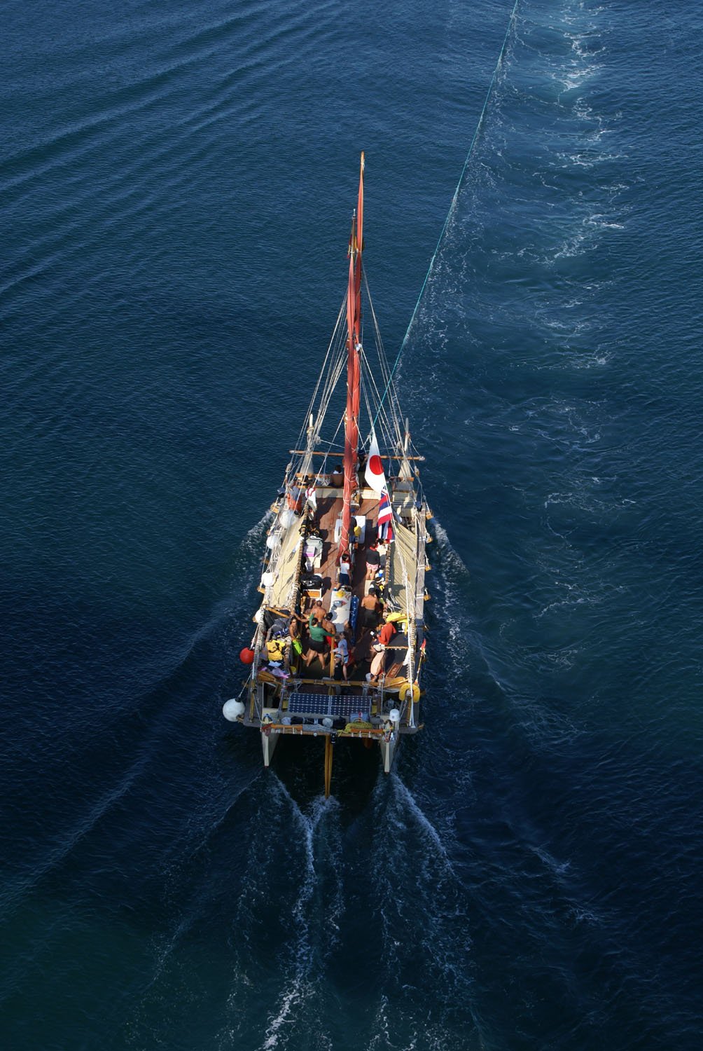 voyaging canoe Hokule'a at Suo Oshima channel, Yamaguchi, Japan